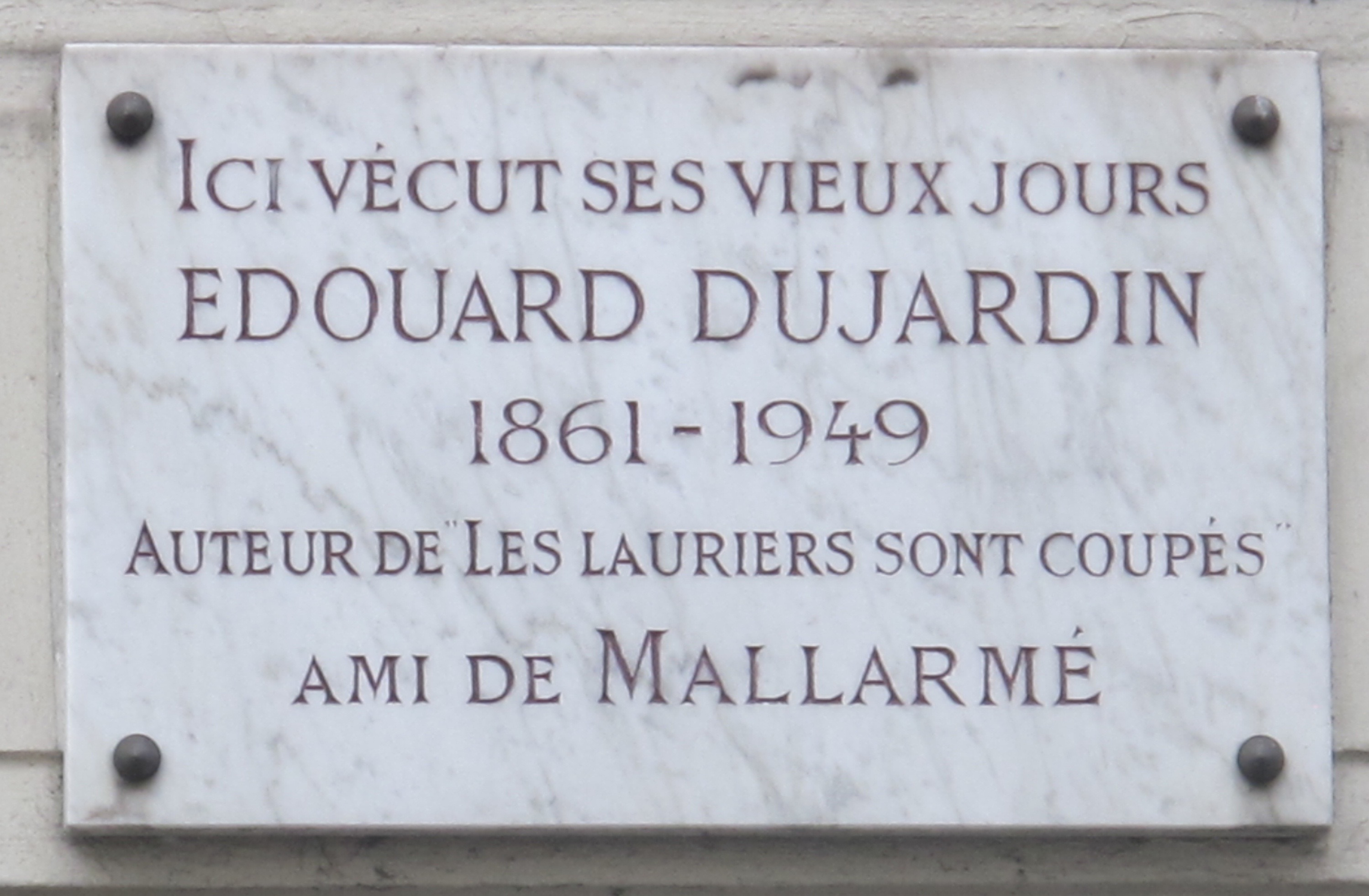 Plaque en l'honneur du romancier Édouard Dujardin au 21 rue Singer (Paris, 16e).